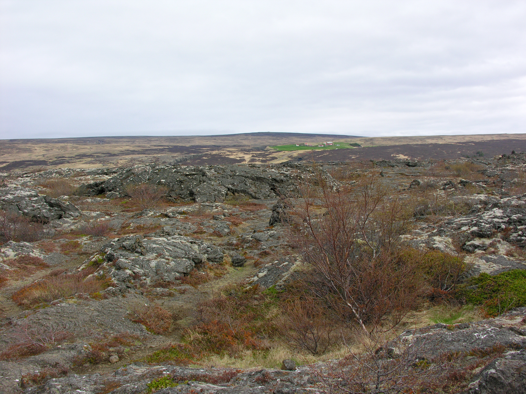 Iceland, Hraunfossar